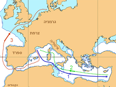 אוניית המעפילים אקסודוס - מסלול